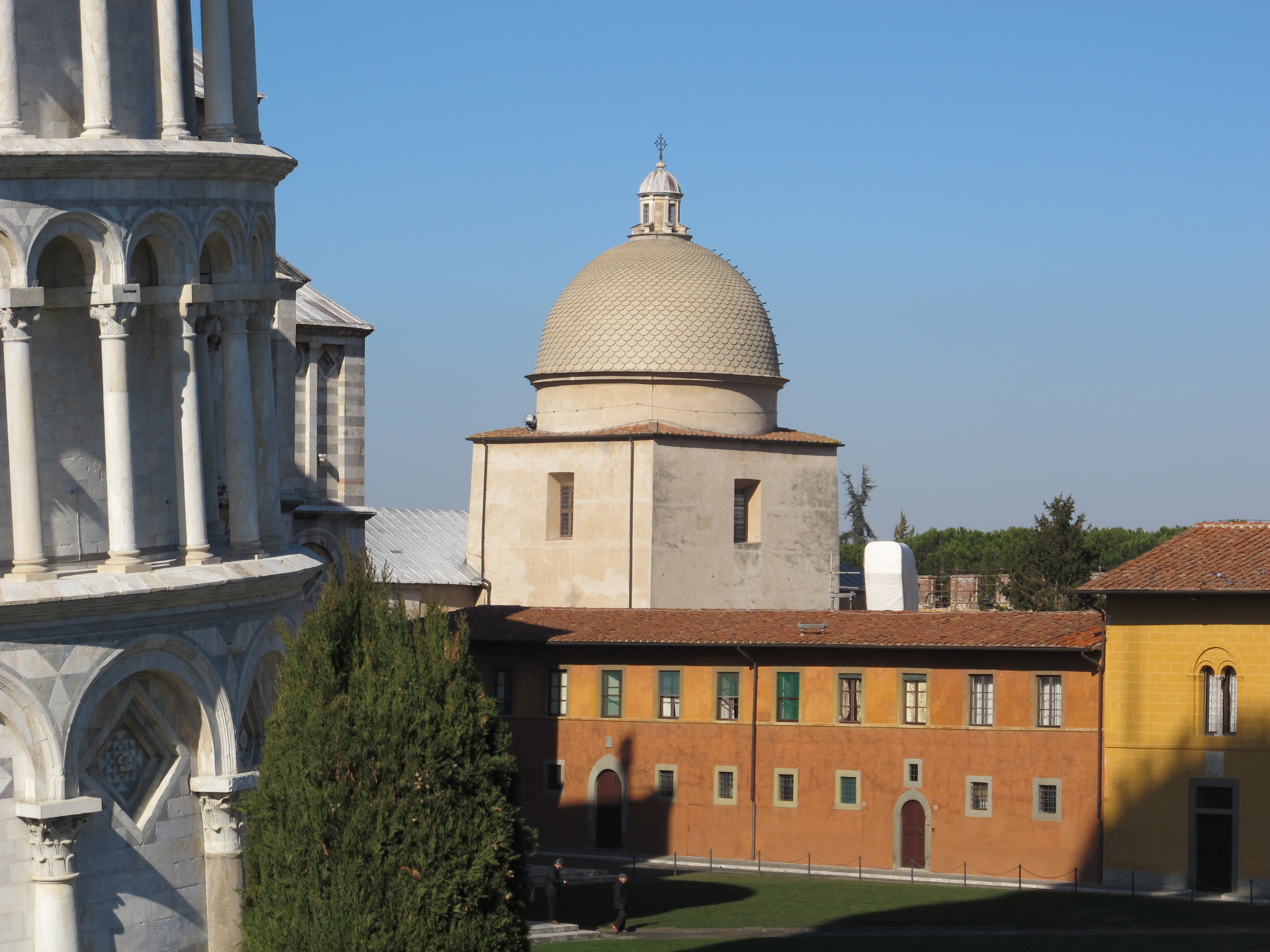 Cappella camposanto vista dal cortile dell'opera del duomo